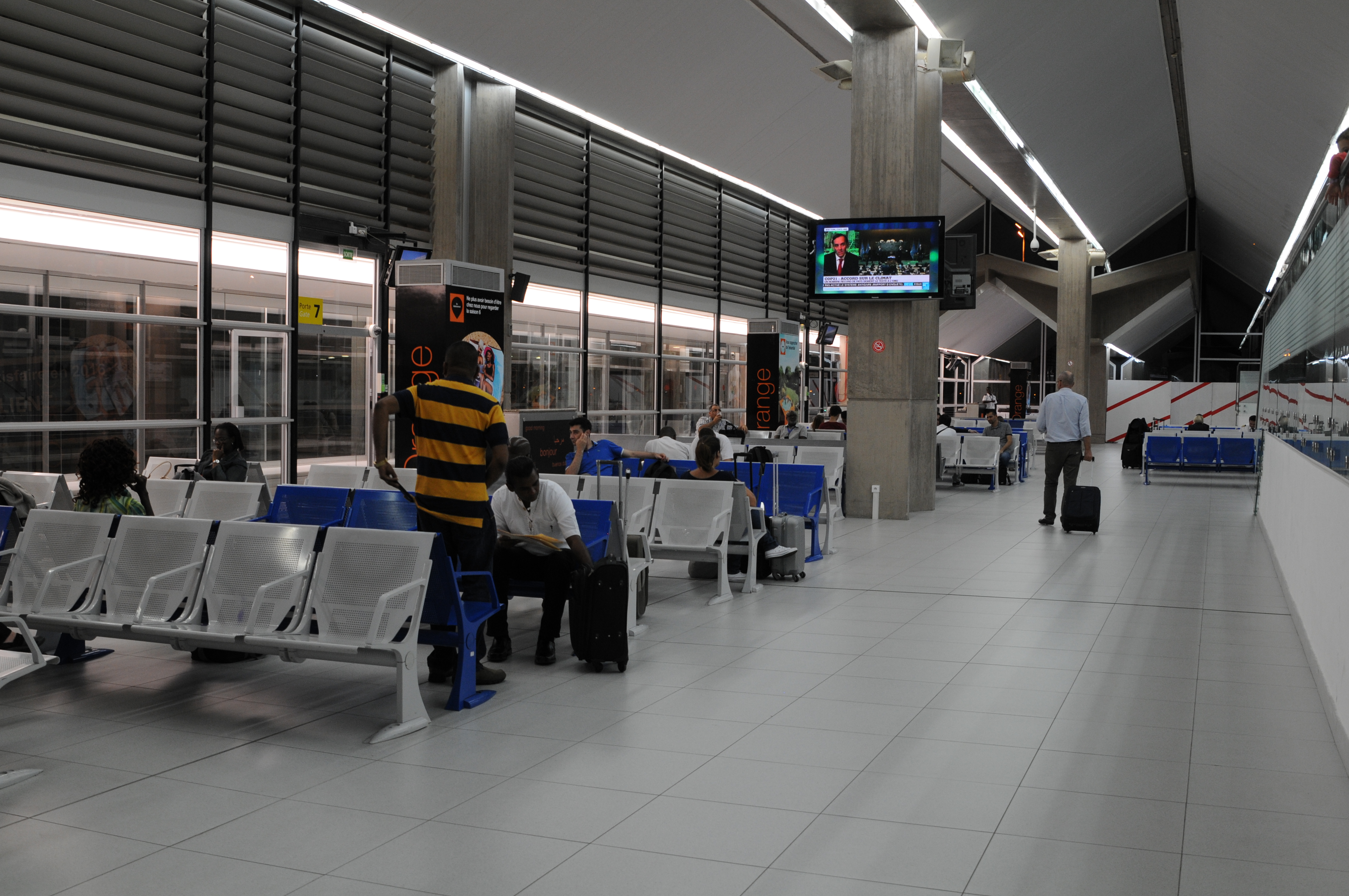 Salle d'embarcation de l'Aéroport International Félix Houphouët-Boigny